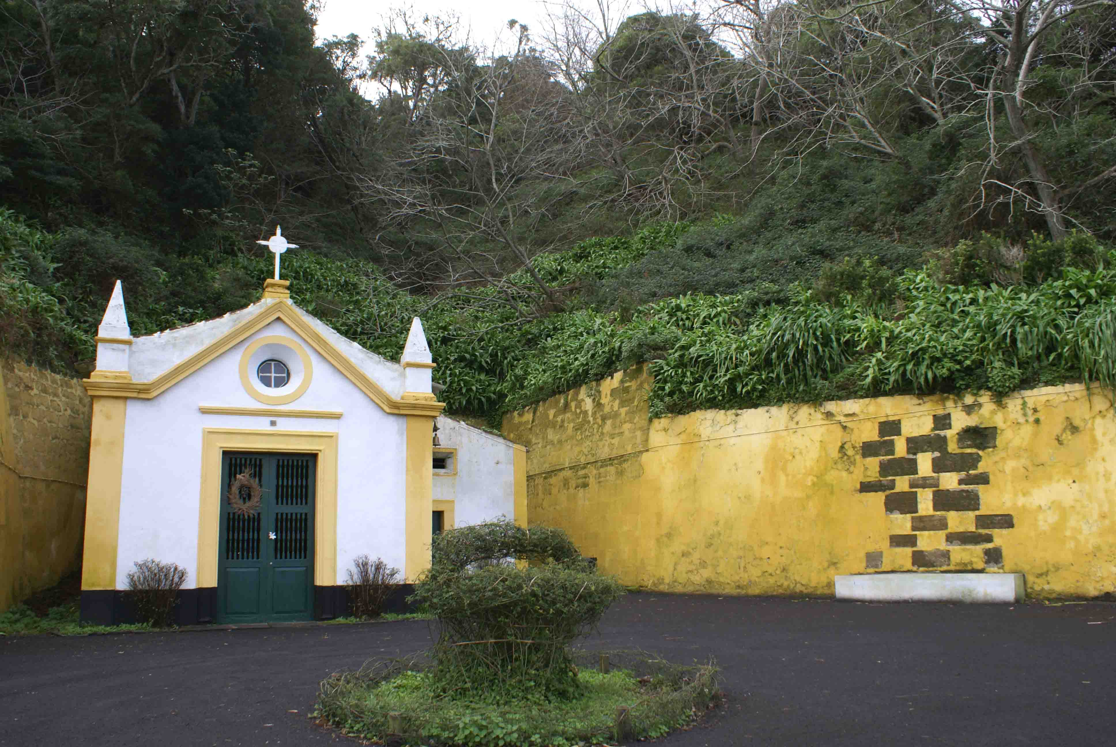 Ermida de Santo António, Monte Brasil, ilha Terceira, Açores, Portugal.